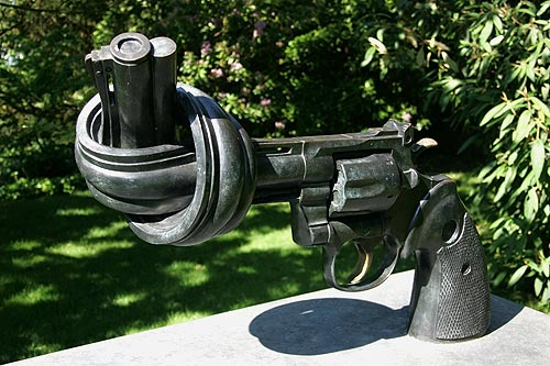 Lausanne:Non Violence sculpture/ Skulptur gegen Gewalt (Musée olympique)